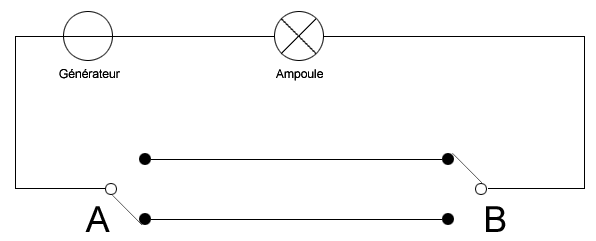 Schéma électrique d'un circuit de va et vient.